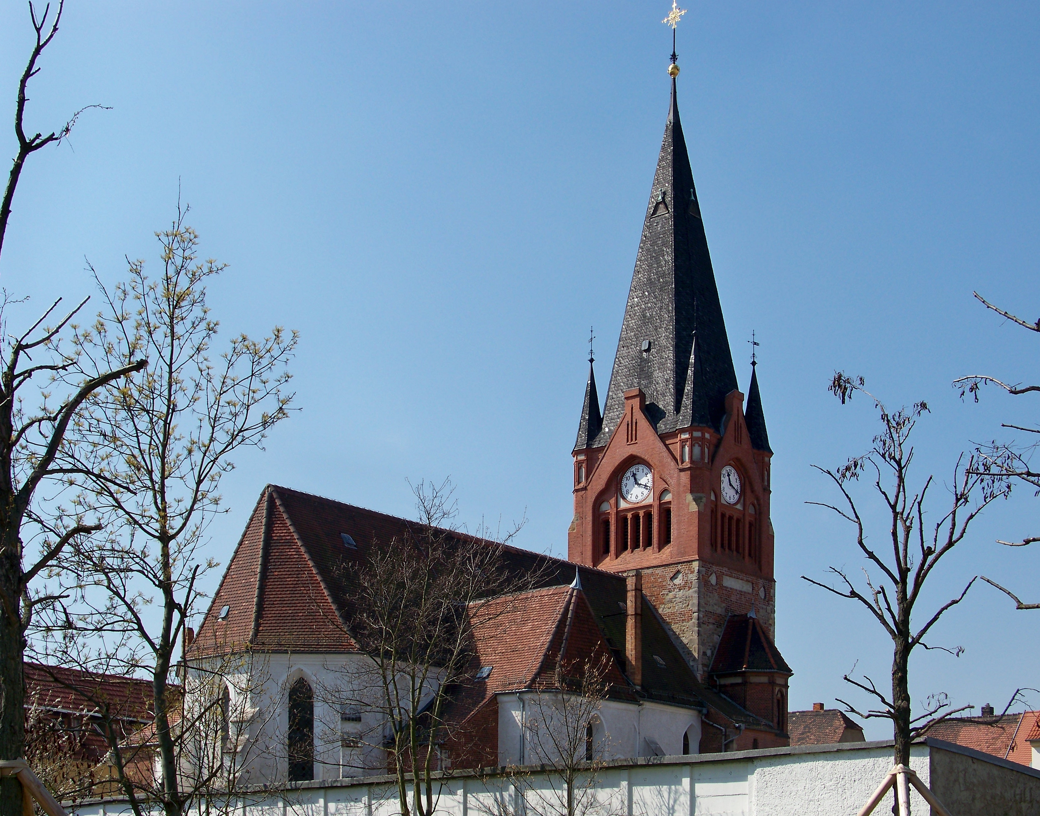 St. Albani in Schkeuditz/Sachsen